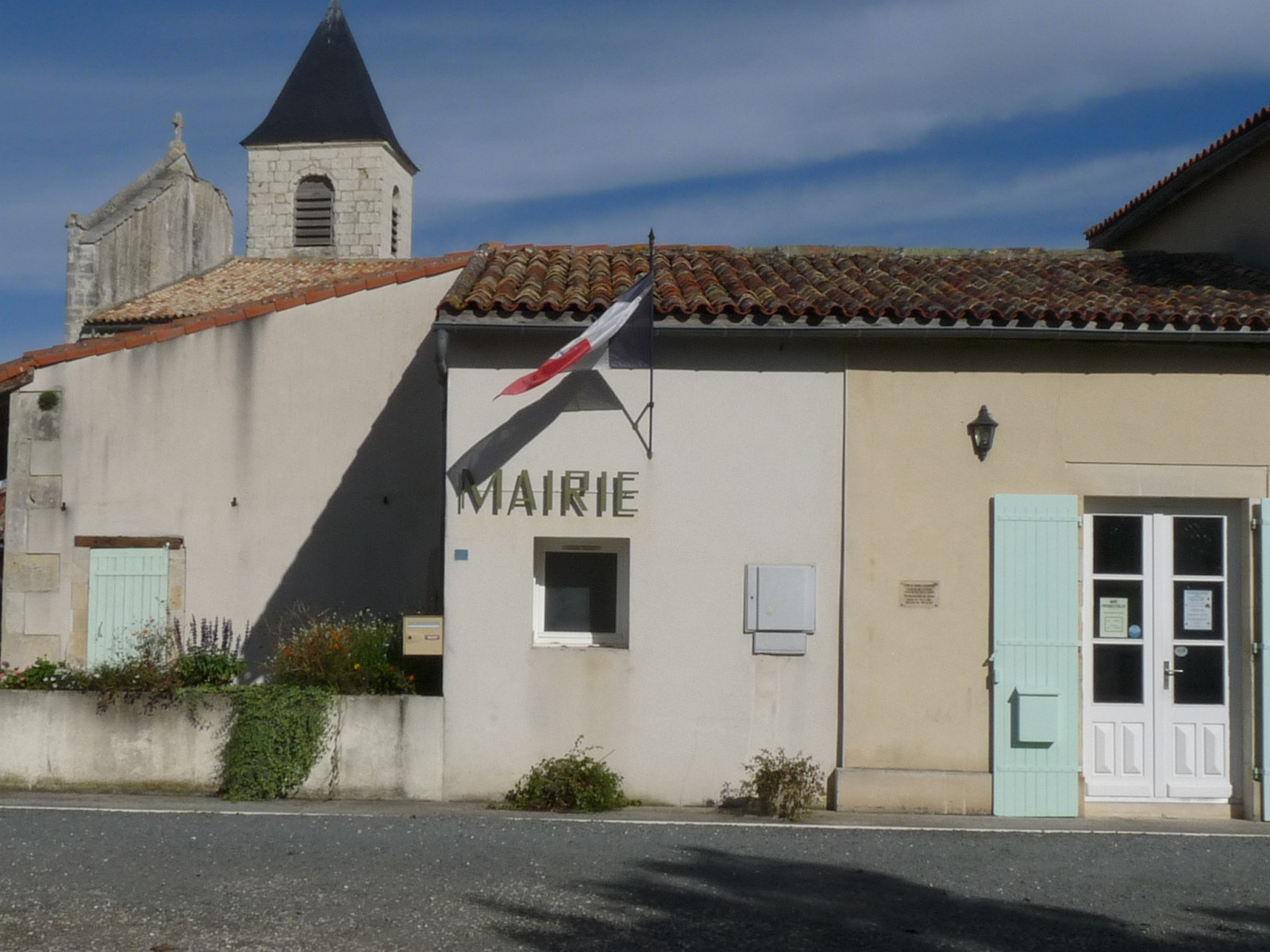 Mairie de Fontaines-d'Ozillac, Charente-Maritime, France